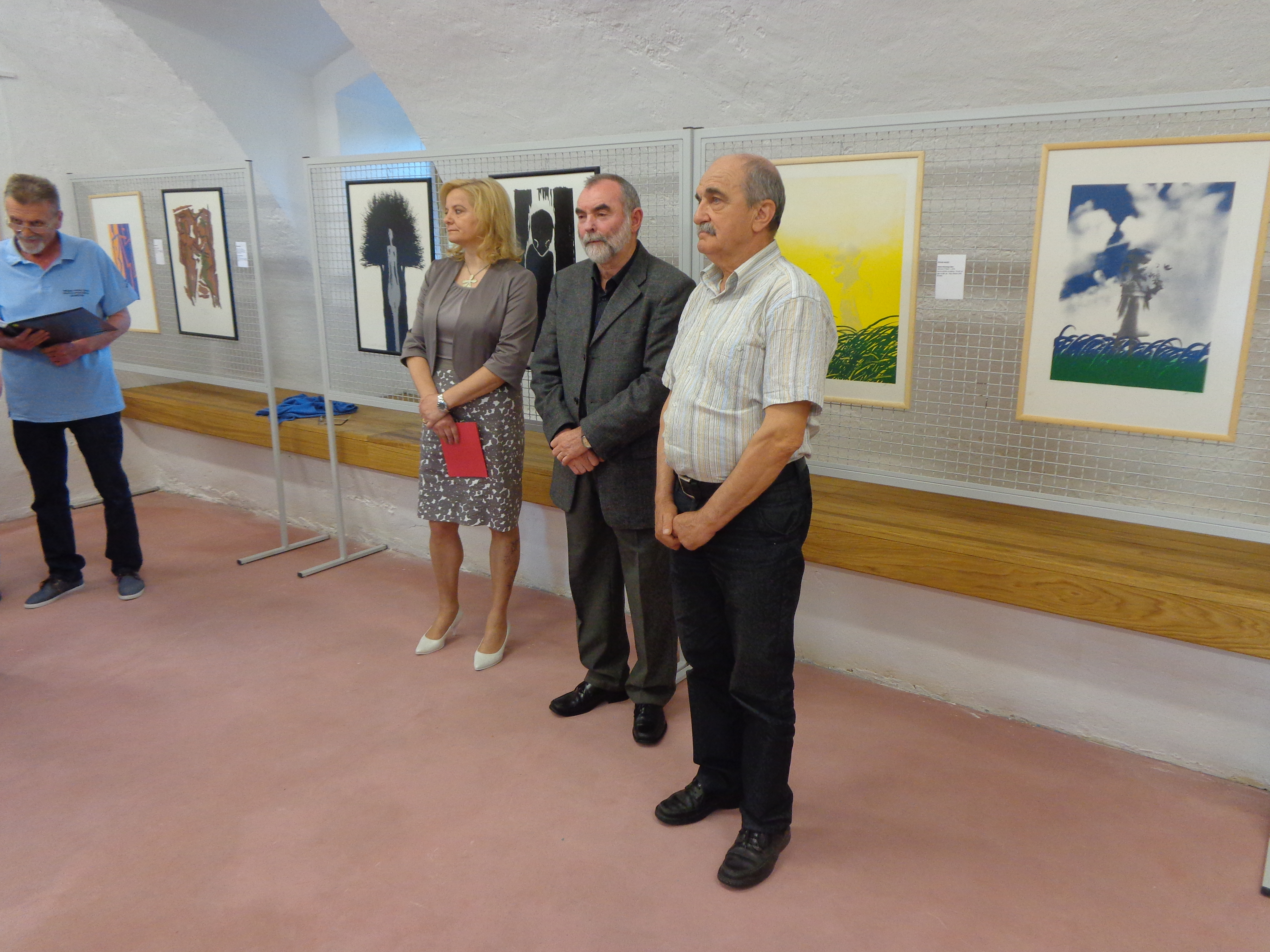 Galerija Društva SIJ - objekt Vogler